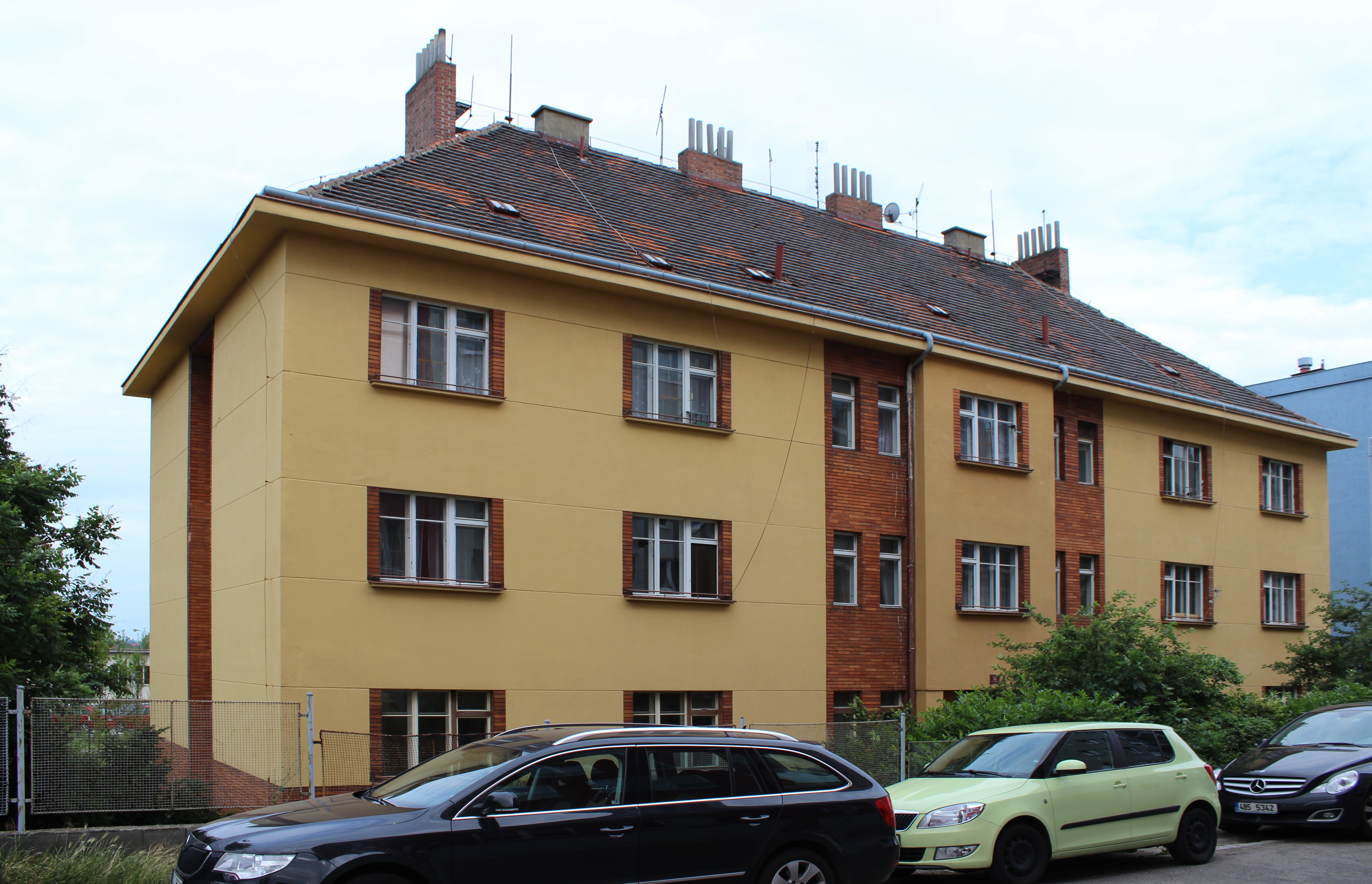 Dům číslo popisné 92, číslo orientační 10 v pražské Elektrárenské ulici.